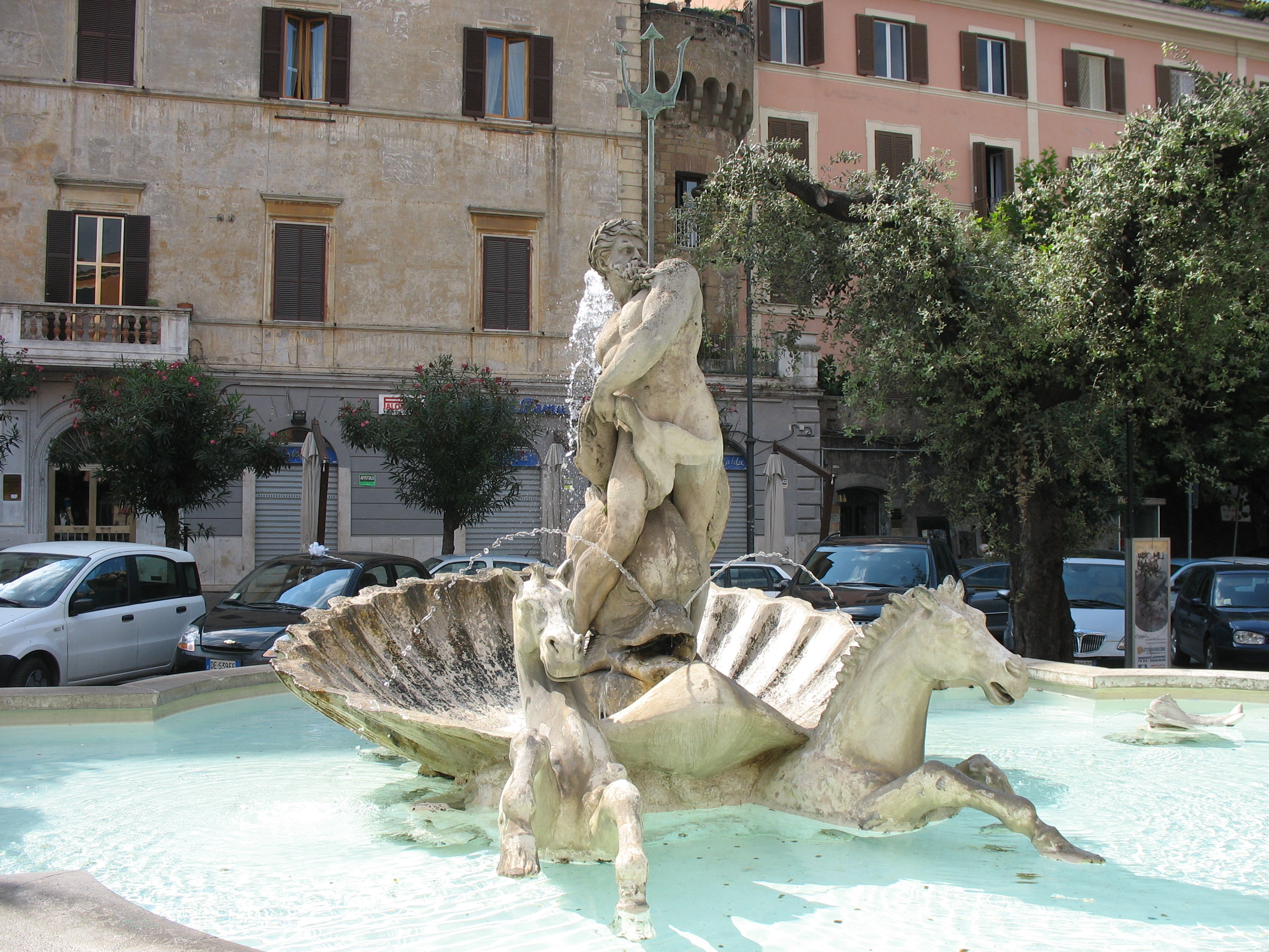 Stefano, foto mia, fontana in piazza mazzini, GFDL